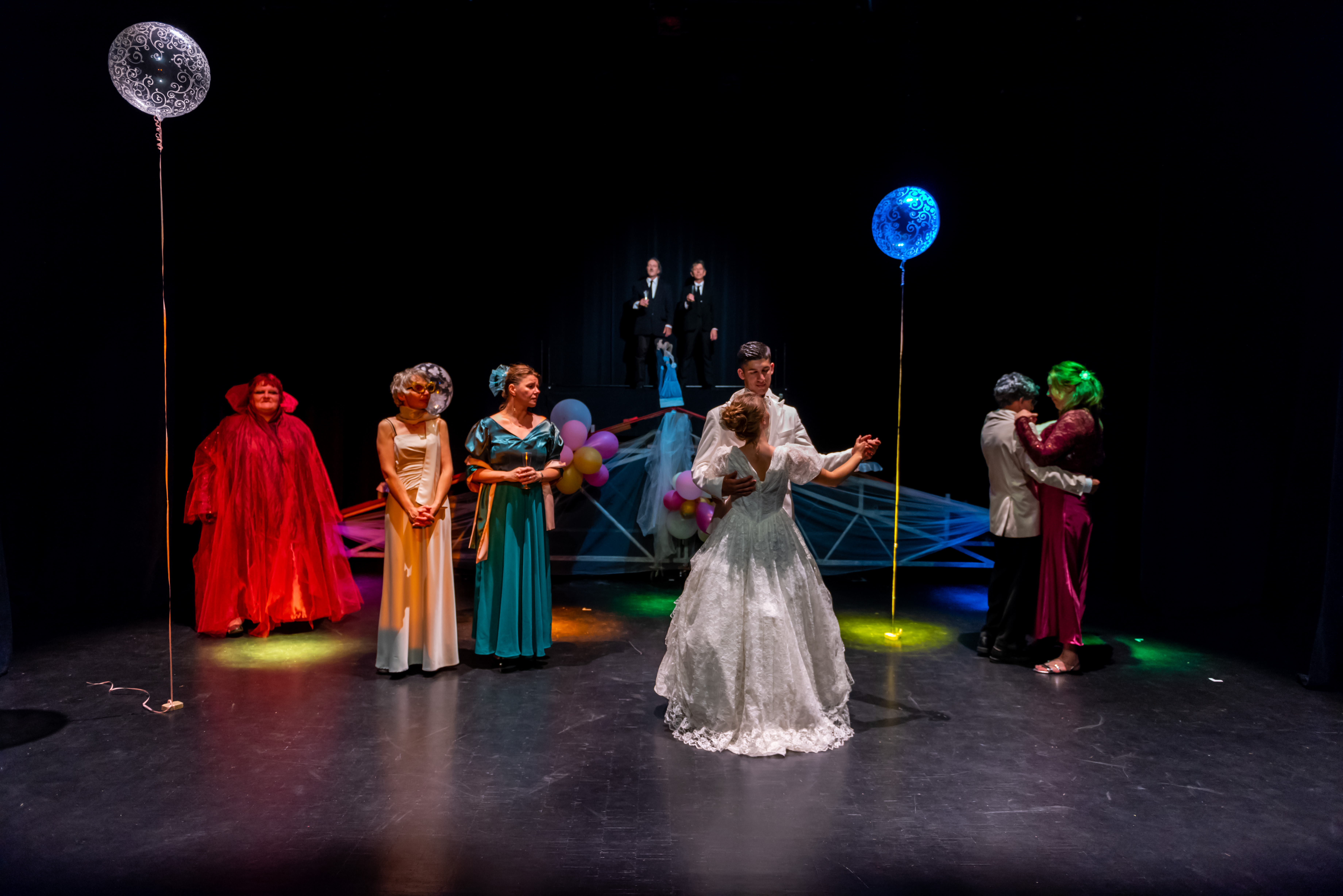 2018 Les noces funèbres